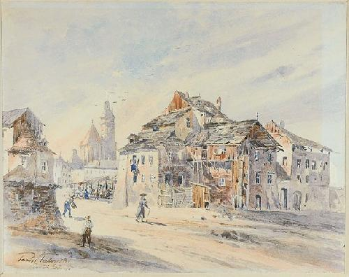 Teodor Talowski, Krakowski Kazimierz, akwarela, 38,5 x 49 cm